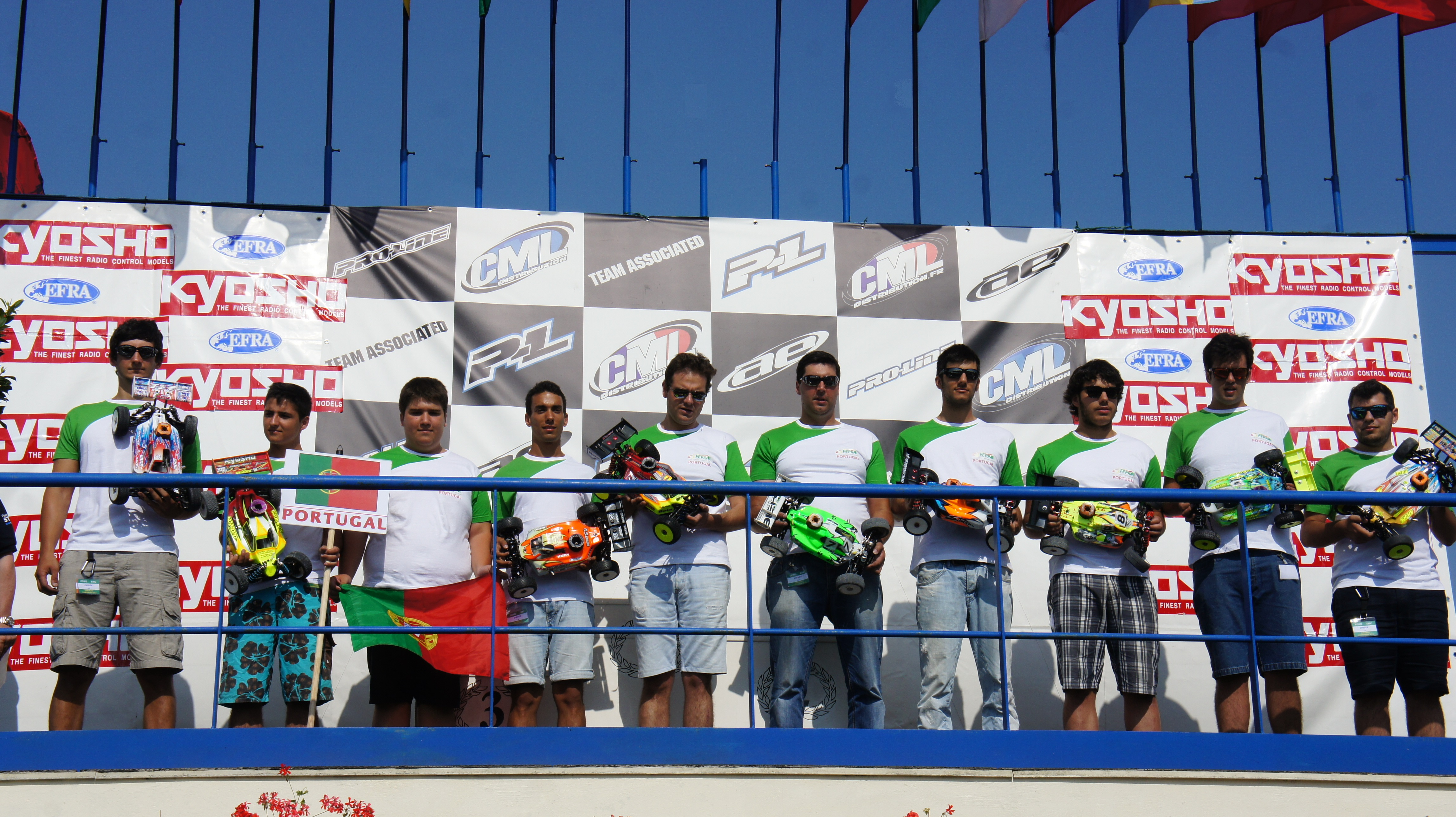 Lors du Championnat d'Europe EFRA de 2013 à Reims.